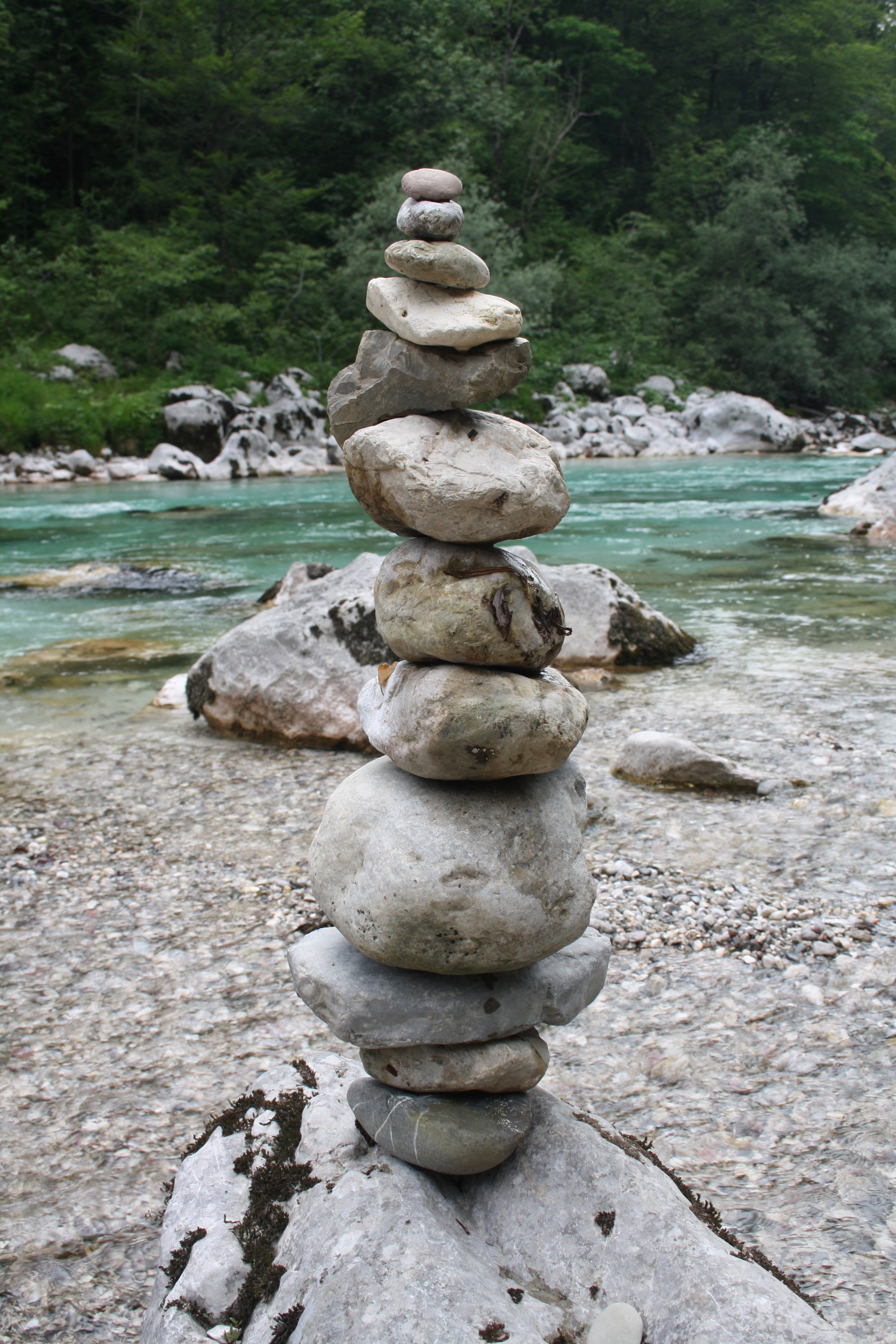 Fiume Isonzo presso Caporetto Kobarid